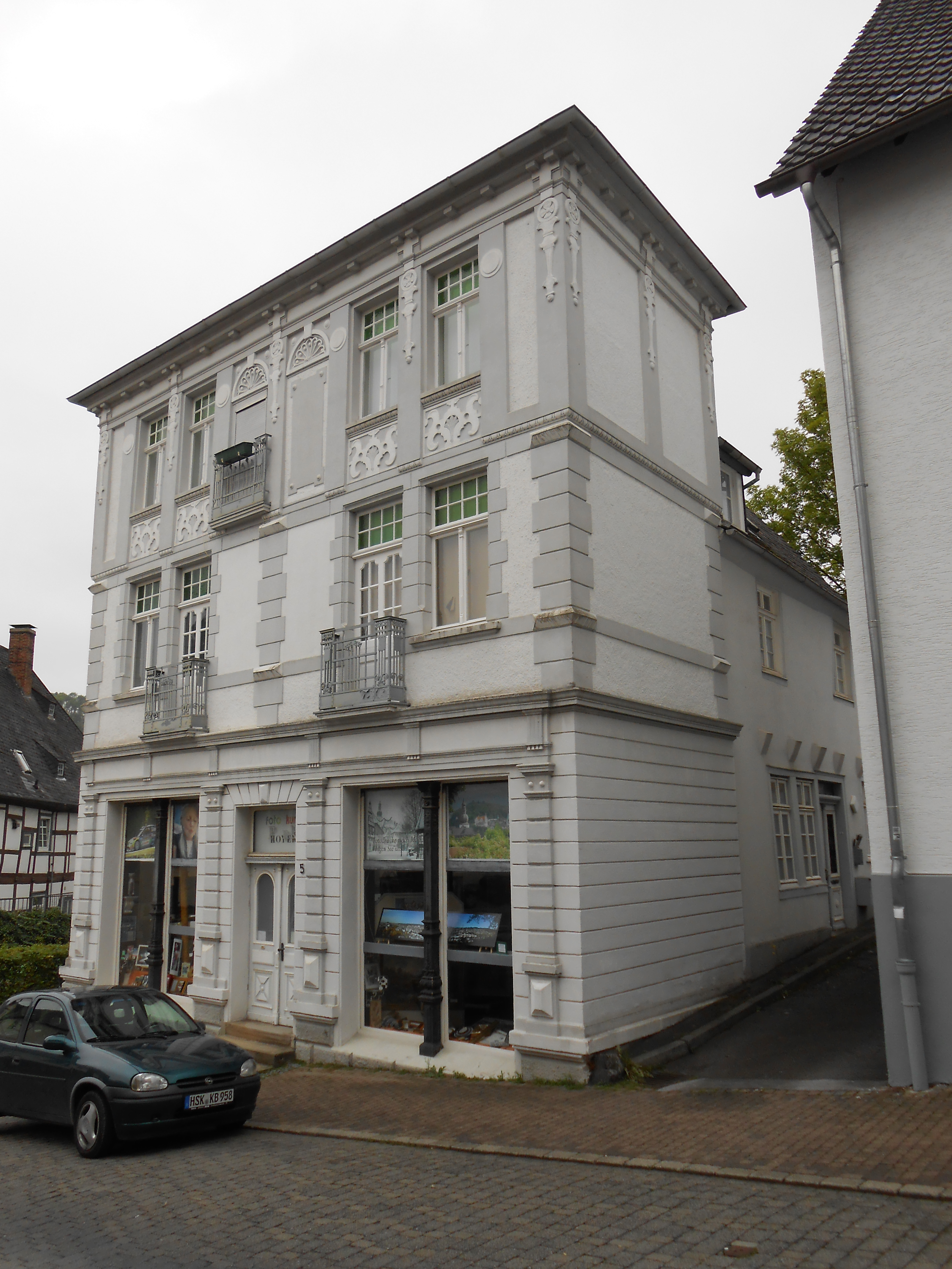 Denkmal Arnsberg Apothekenstraße 5